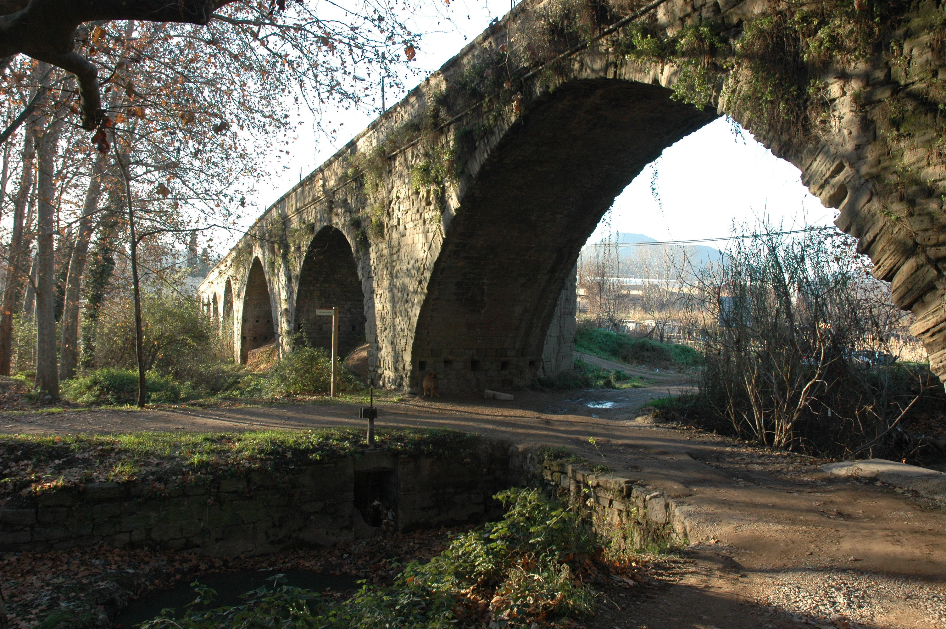 Manresa (Catalunya, Espanya) - Pont nou des de sota